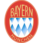 Logo Bayernu w latach 1961-1965